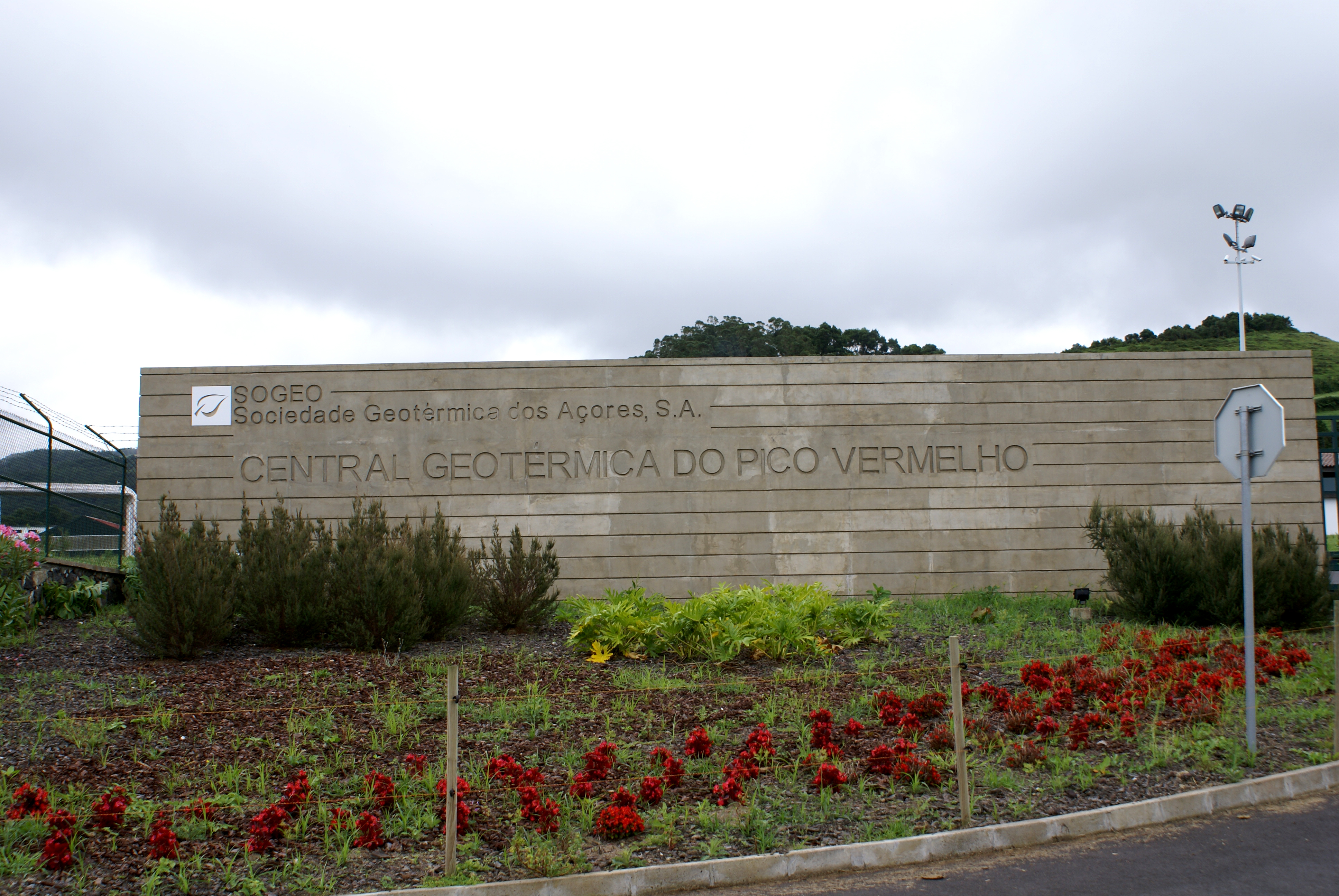 Central Geotermica do Pico Vermelho, Ribeira Grande, ilha de São Miguel, Açores